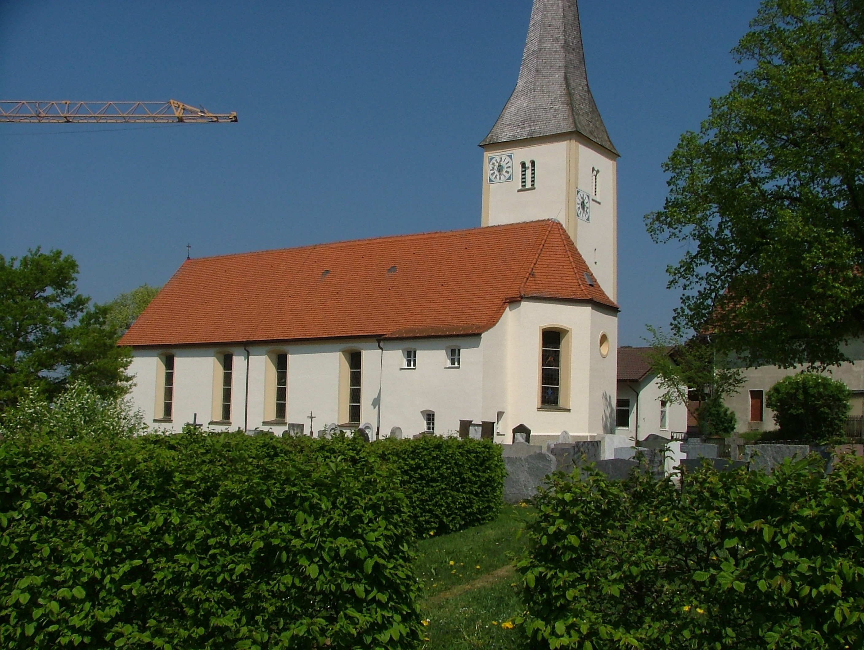 Muthmannshofen